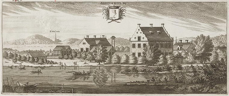 "Skånilaholm" - Skånelaholms slott